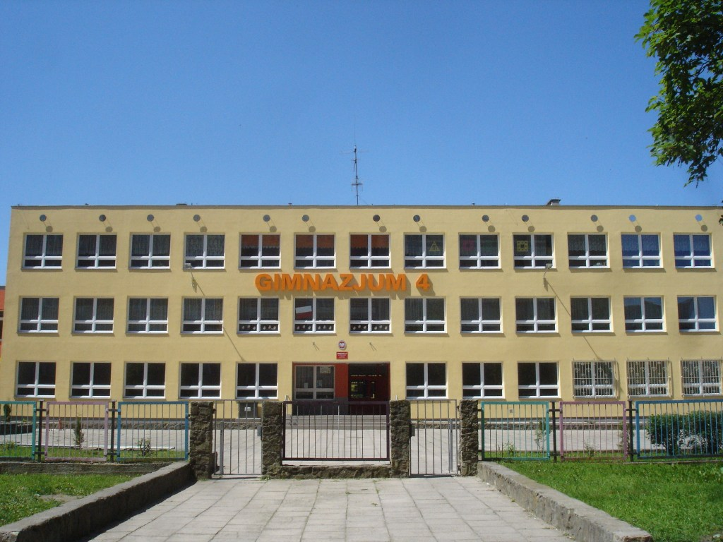 Gimnazjum nr 4 w Stargardzie Szczecińskim